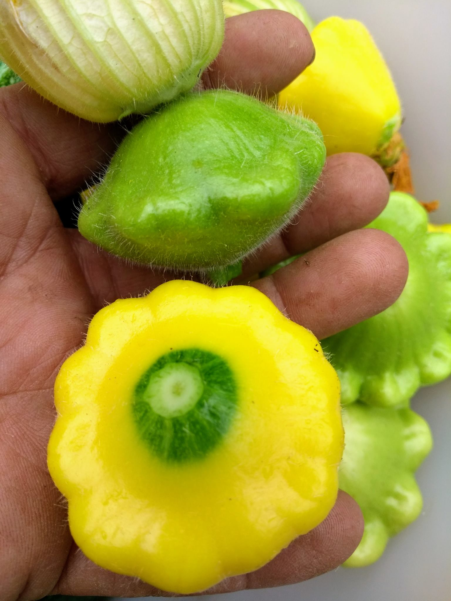 Mini patissons